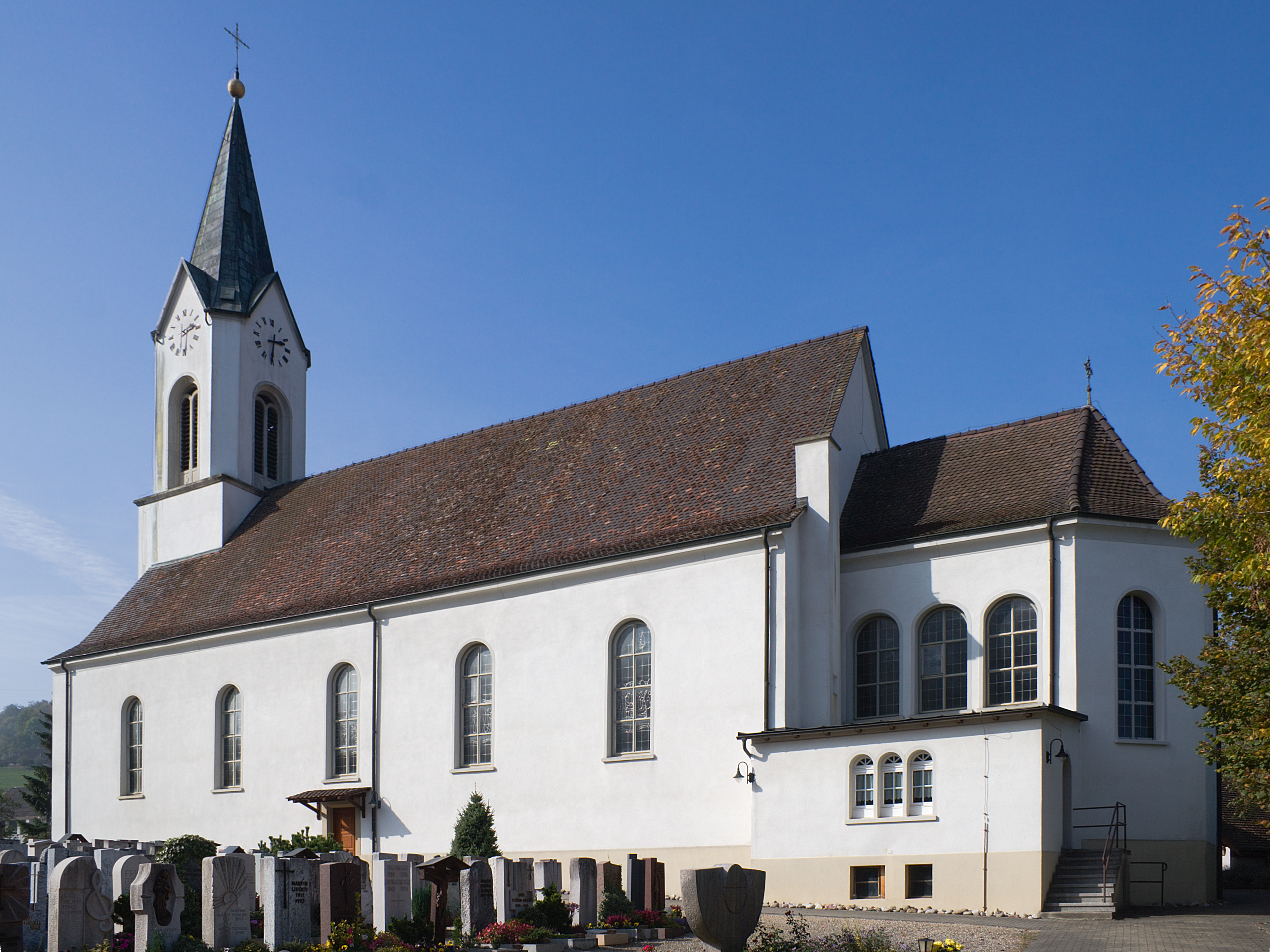 Wittnauer Kirche, Schweiz